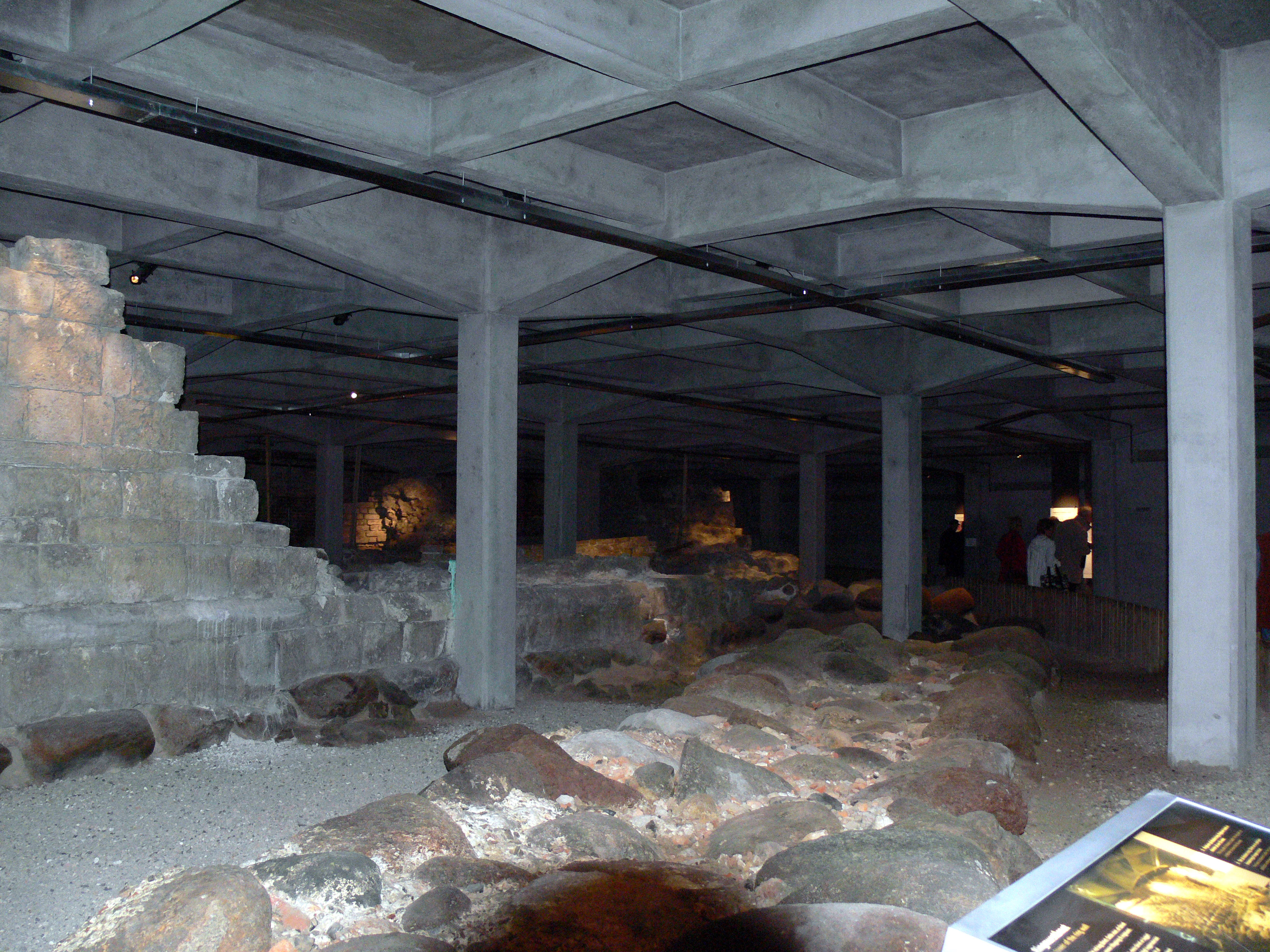 Die Festung des Bischofs Absalon unter dem Folketing in Kopenhagen. Hier die Mauerreste